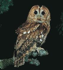 Allocco